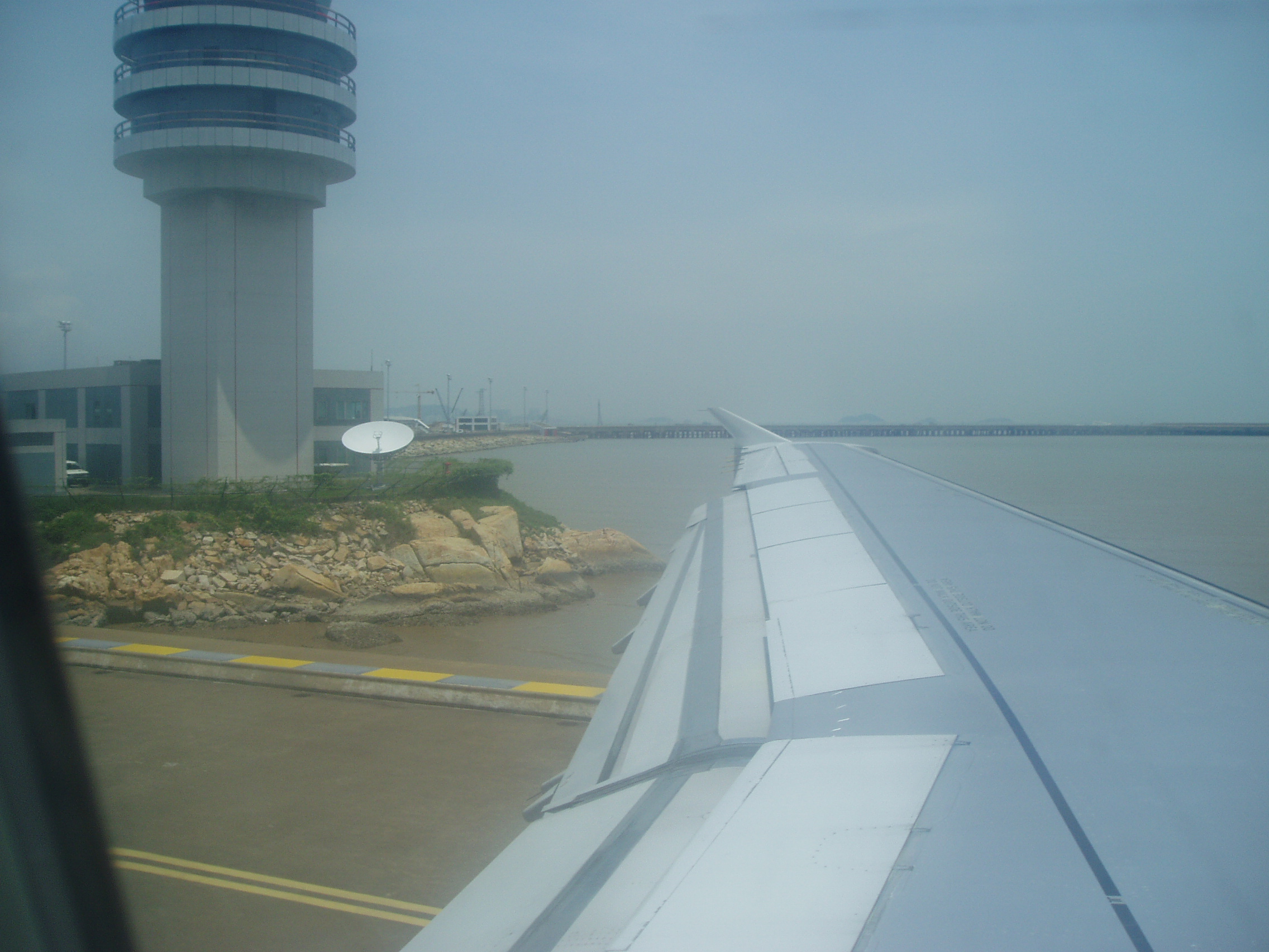 Ilha Kai Kiong